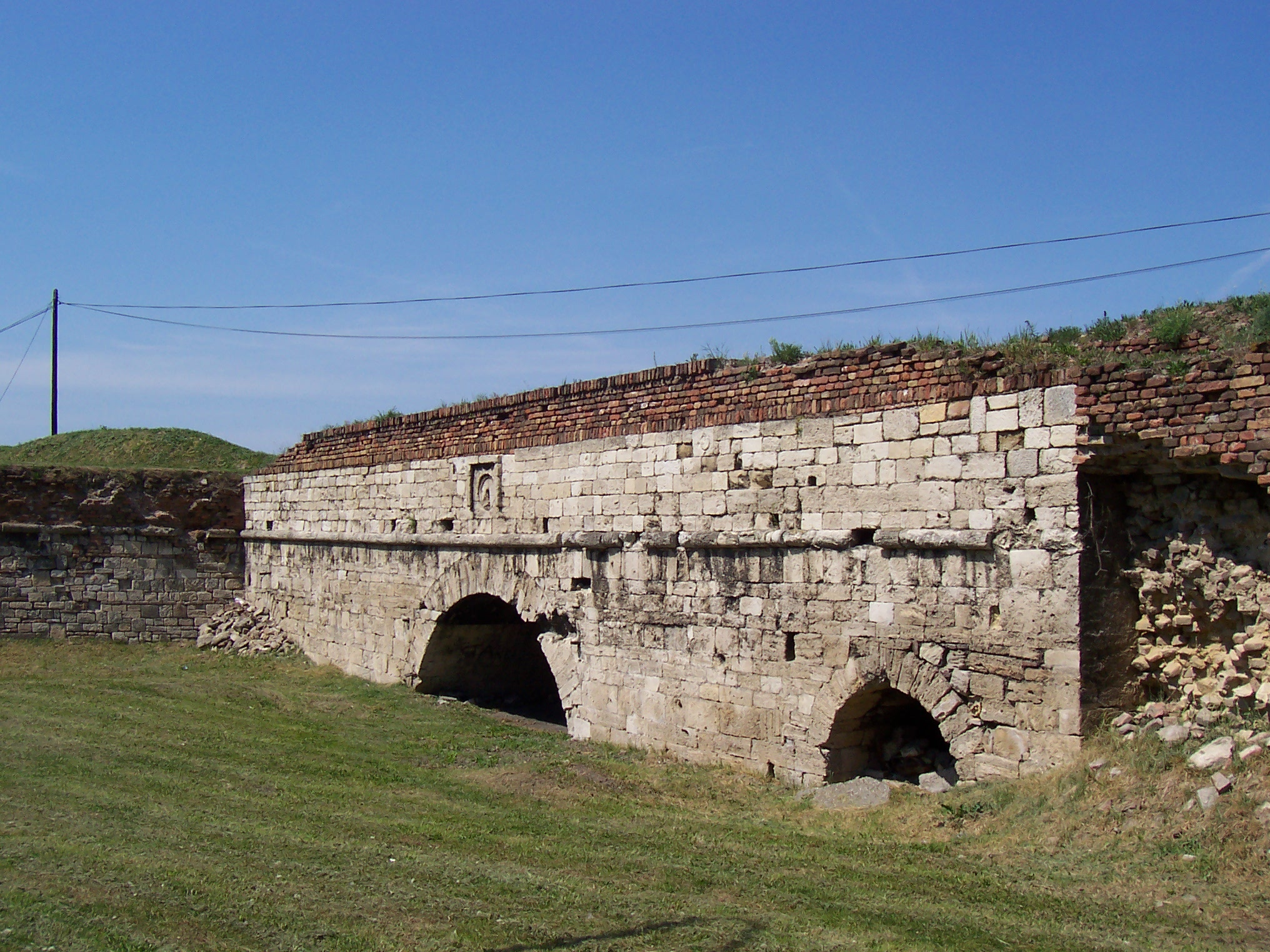 Port Gate at Belgrade's Kalemegdan fortress.